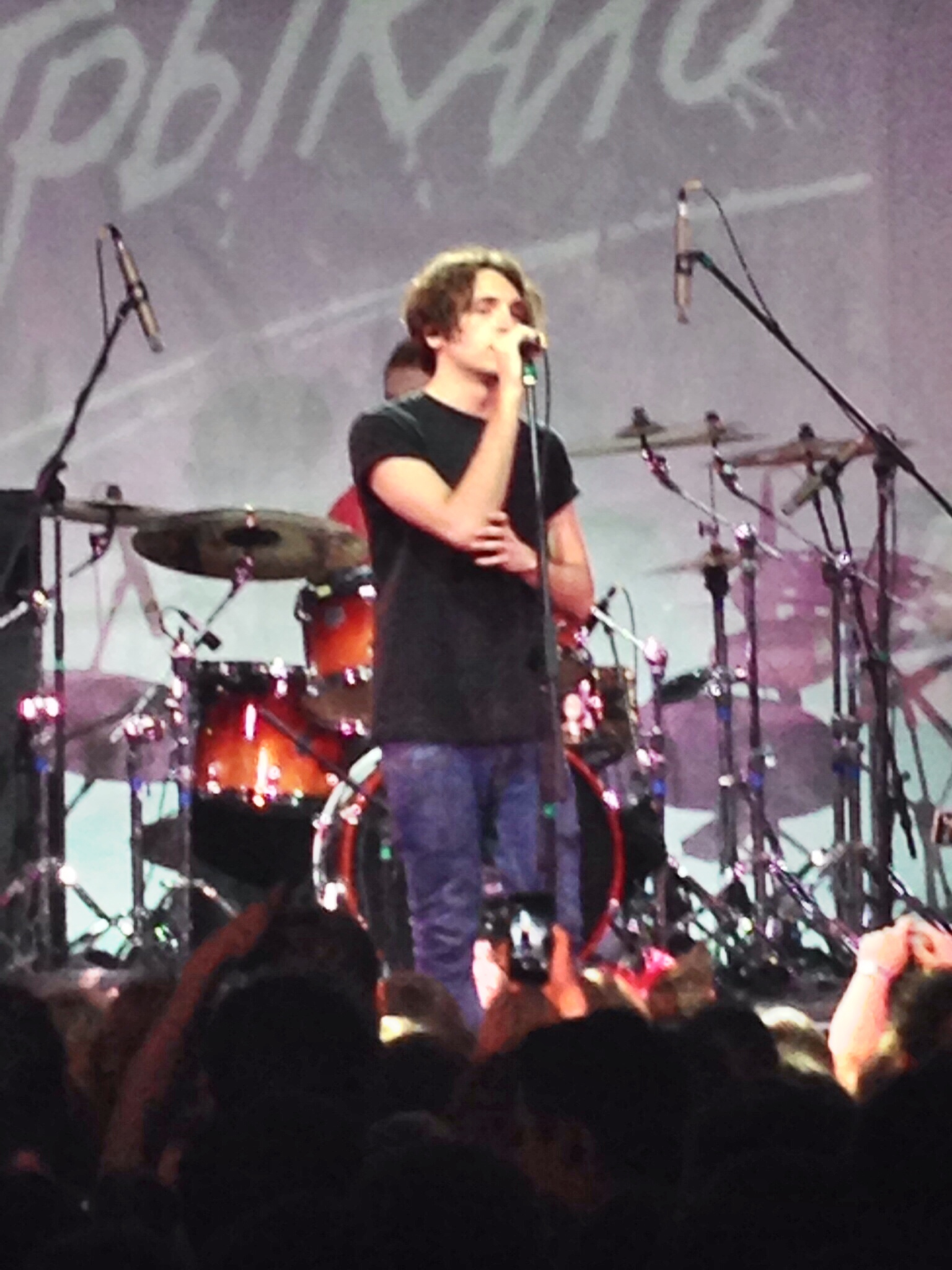 Валентин Стрыкало в Зелёном театре